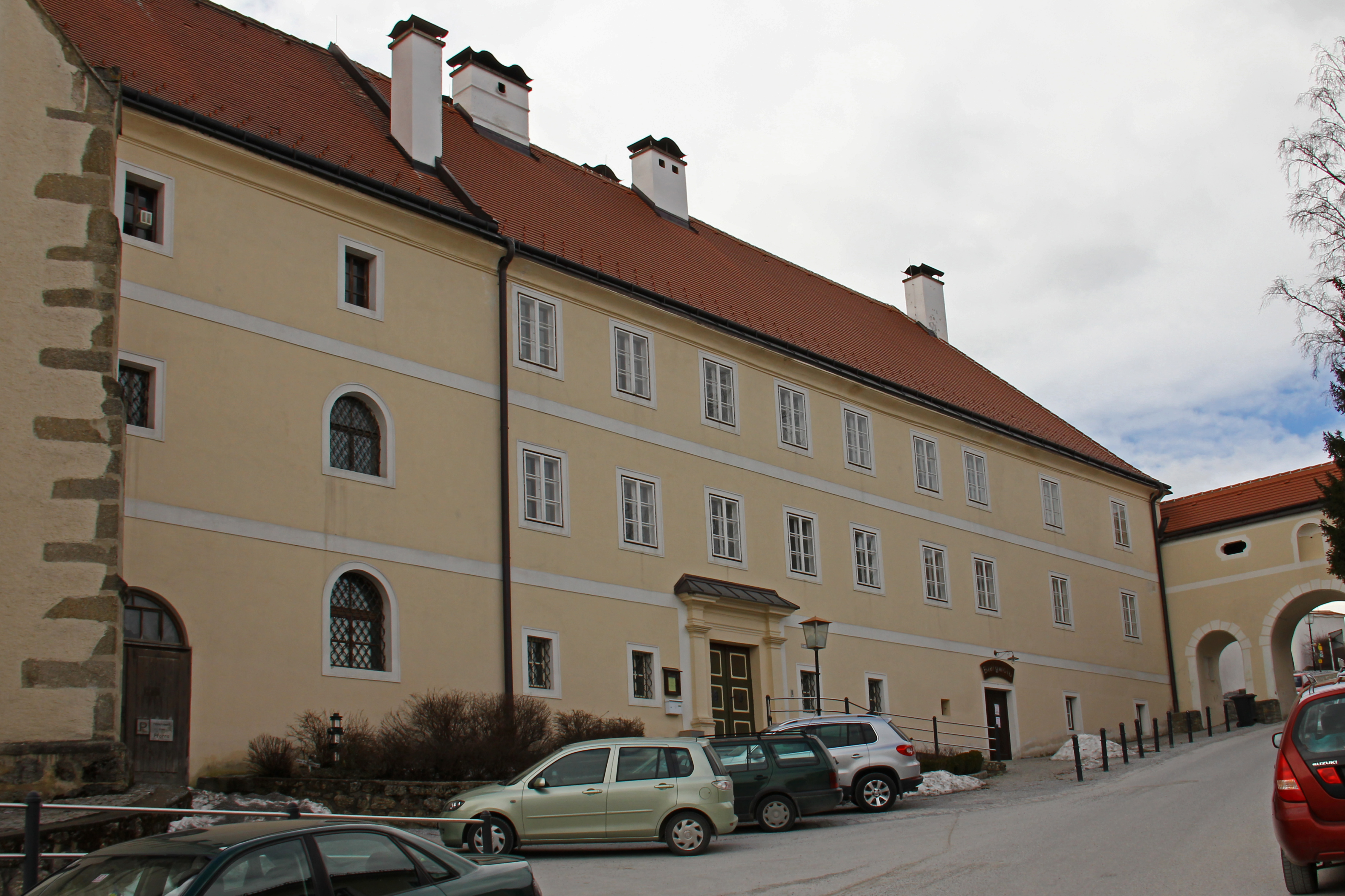 Schlichter Barockbau, ehemaliges Kloster, Grundsteinlegung 1698.